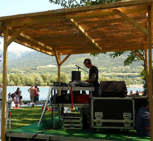 Vue de la scène de l'Aire libre à Embrun (Hautes-Alpes/lac de serre-Ponçon). DJ: Fred Berthet - Dj Steef